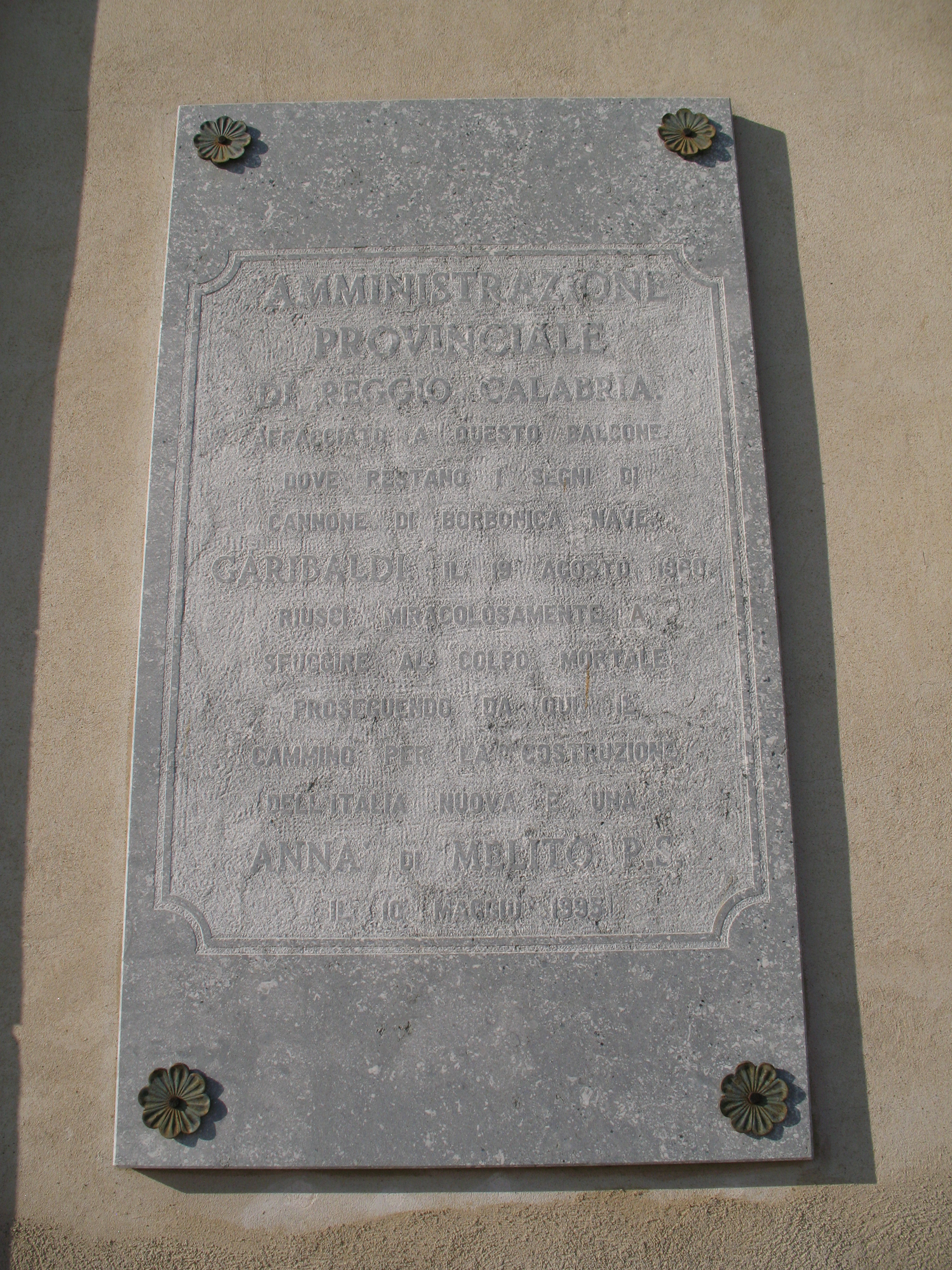 Lapide apposta alla Casina “Ramirez”, dove Giuseppe Garibaldi soggiornò dopo lo sbarco a Melito di Porto Salvo (19 luglio 1860), dalla Provincia di Reggio Calabria.